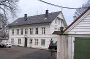 Kammerråd Christian Lerche Dahl eide hovedgården på slutten av 1700-tallet. Han fikk bygd hovedhuset, som sener ble ombygd i sveitserstil. Inngangspartiet er i empirestil, sannsynligvis er det husets opprinnelige stil. Fotograf Ine Merete Baadsvik, Bergen Byarkiv, 2011